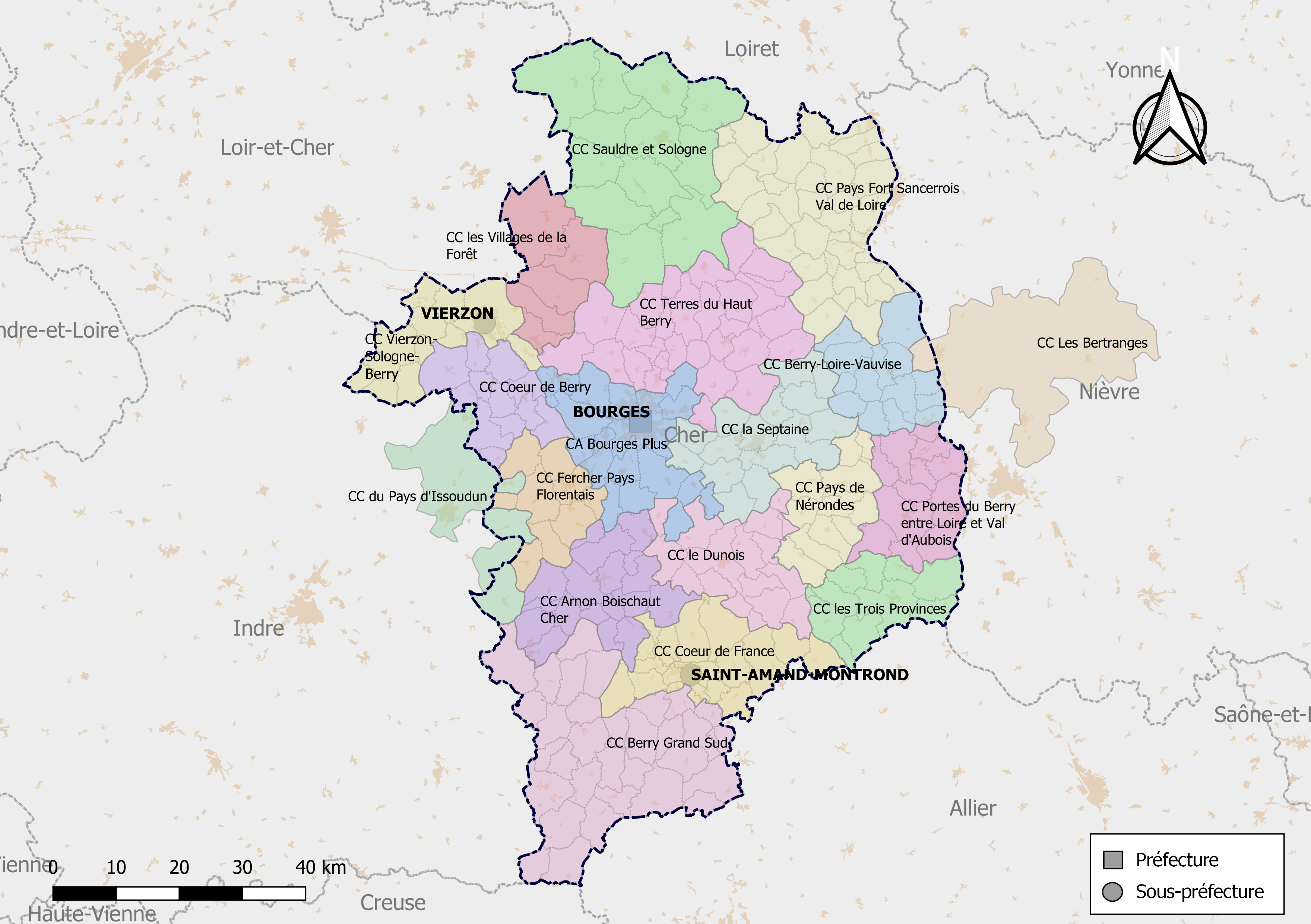 Carte des intercommunalités du département du Cher, France. Composition au 1er janvier 2019